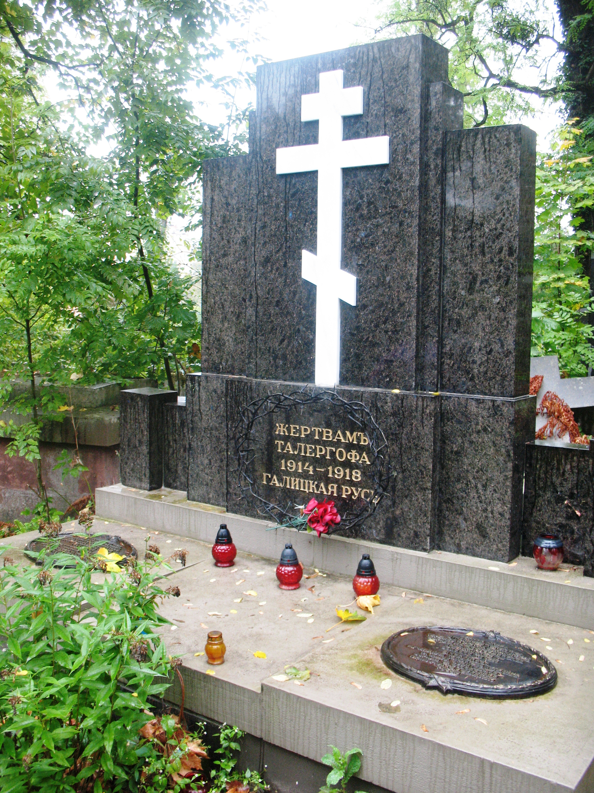 Монумент жертвам Талергофа во Львове на Лычаковском кладбище